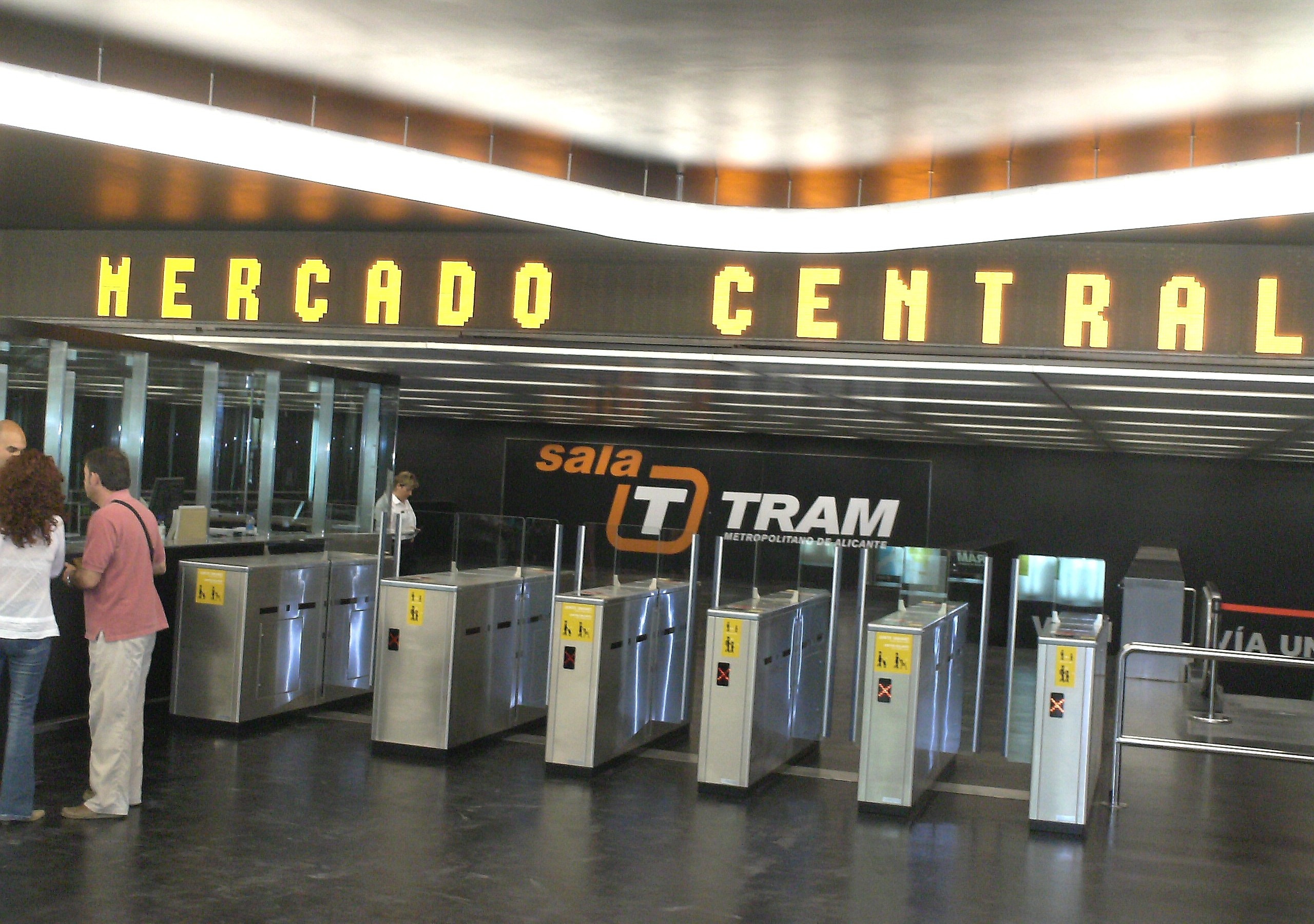 B-Ebene der Station Mercado der Stadtbahn Alicante / Nivel intermedio de la estación Mercado del TRAM Metropolità d'Alacant